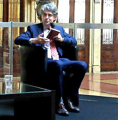 Alessandro Cassinis ad un convegno al palazzo della Borsa Genova 18-06-2016